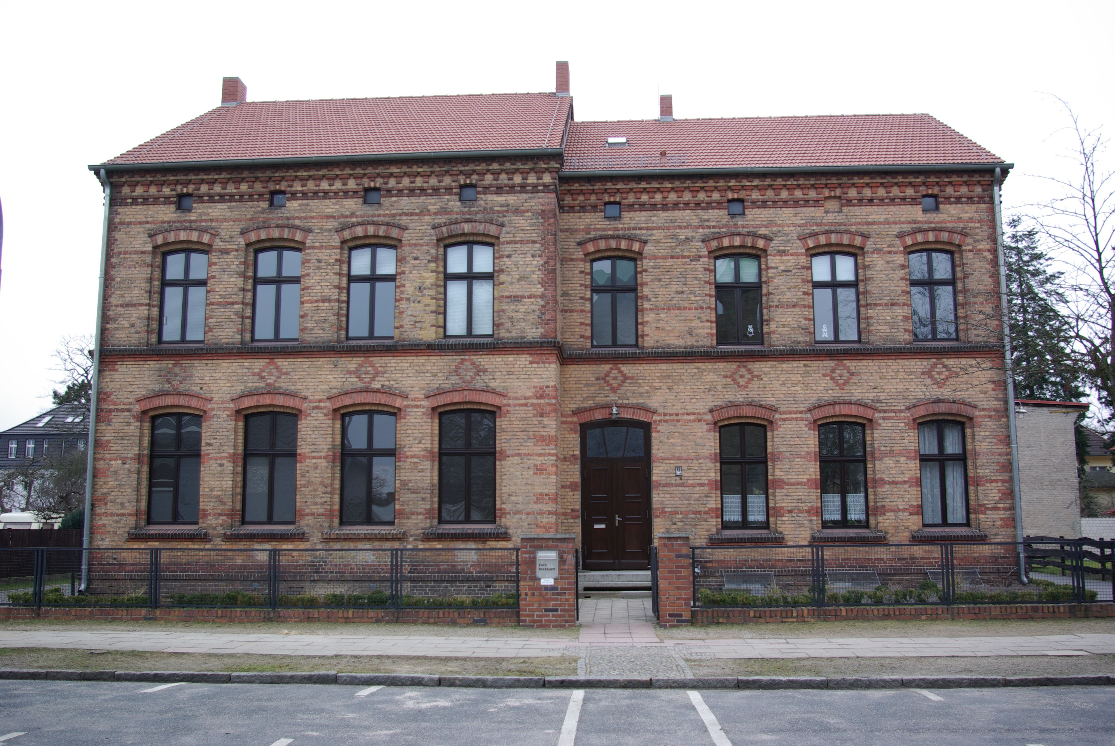 Königs Wusterhausen in Brandenburg. Das katholische Pfarrhaus liegt in der Friedrich-Engels-Straße gegenüber der katholischen Kirche. Das Pfarrhaus ist mit der Kirche zusammen dankmalgechützt (geotags in den exif-daten).